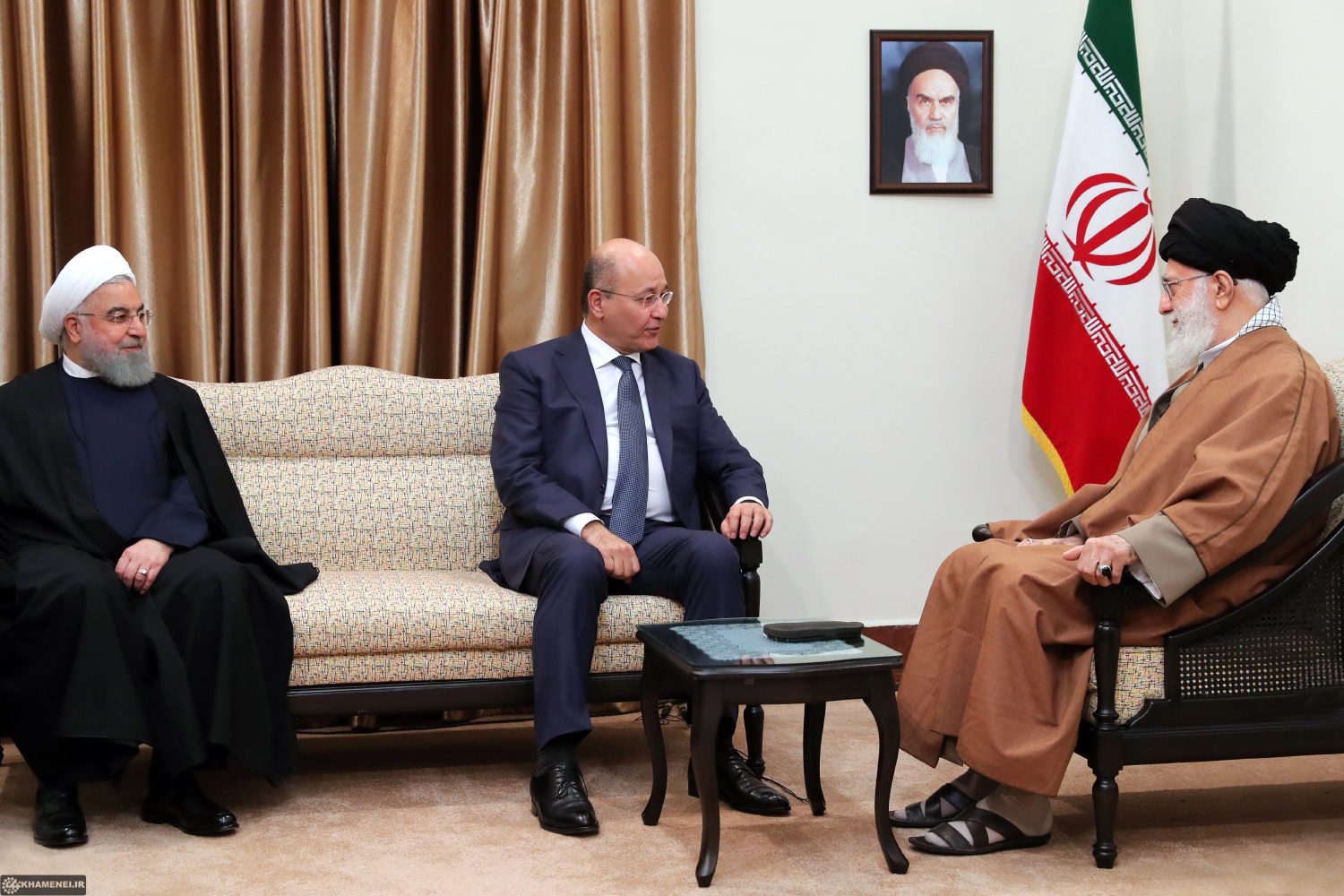 Premier rencontre Barham Salih avec Ali Khamenei au Tehéran en 2018